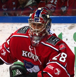 Dennis Endras, Goaltender, Goalie, Helsinki IFK, Eishockey